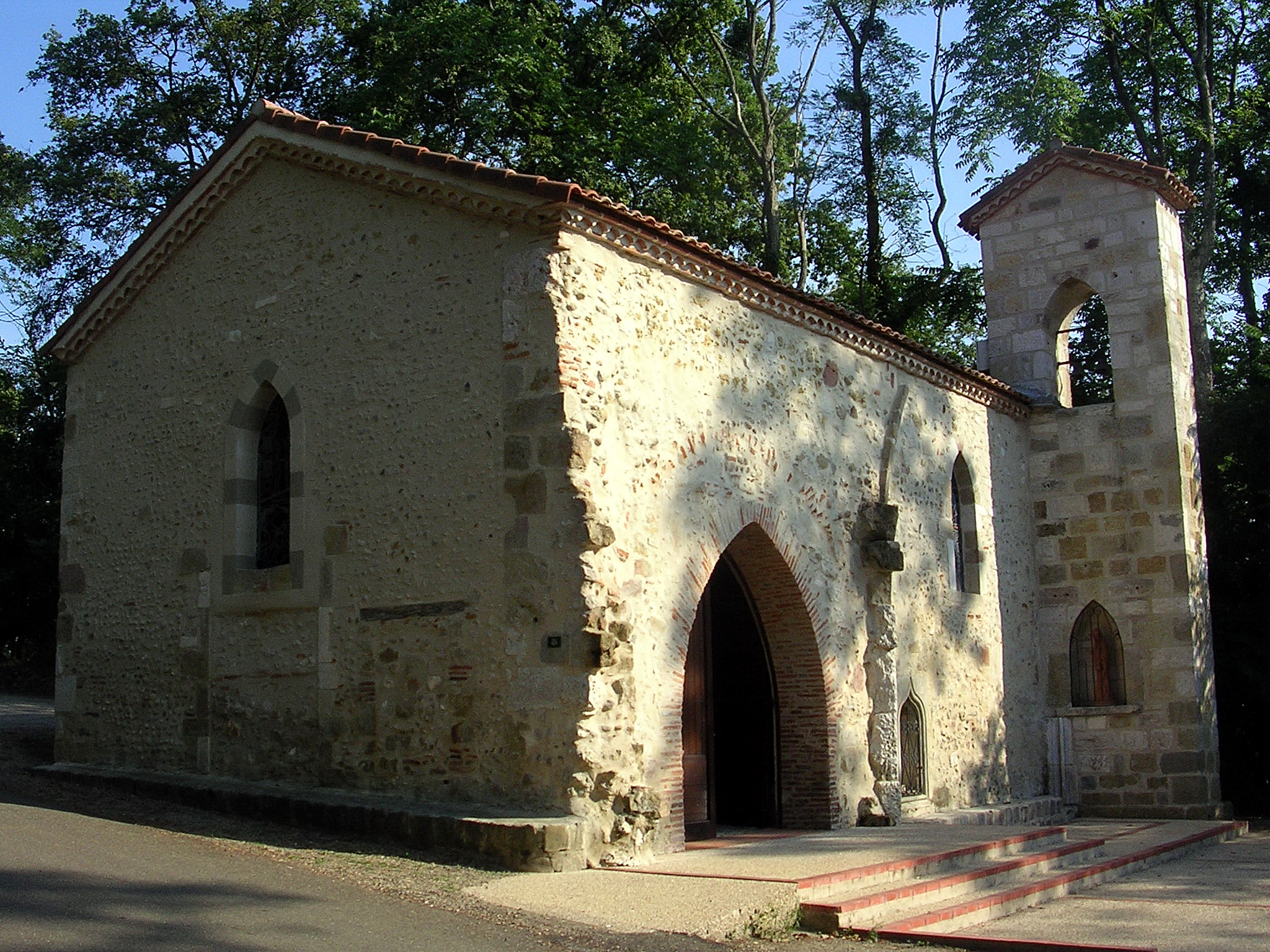 Eglise Notre-Dame-du-Rugby, Larrivière (Landes, France). Photo prise par Jibi44 en juillet 2006.